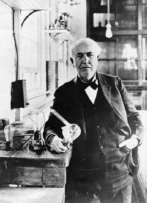 Thomas Edison, foto genomen ca. 1918-1919. Bron: NARA, origineel op